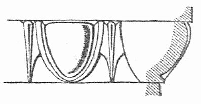 Eierstabkyma. Artikel Kymation in: Meyers Großes Konversations-Lexikon 6. Auflage 1905–1909